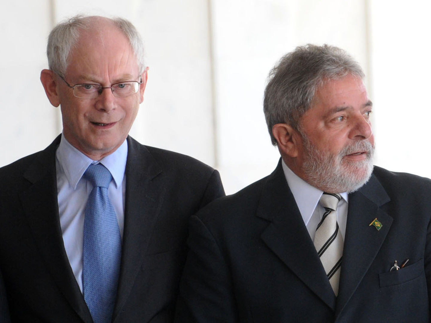 O presidente Luiz Inácio Lula da Silva recebe o presidente do Conselho Europeu, Herman Van Rompuy para abertura da 4ª Cúpula Brasil-União Europeia